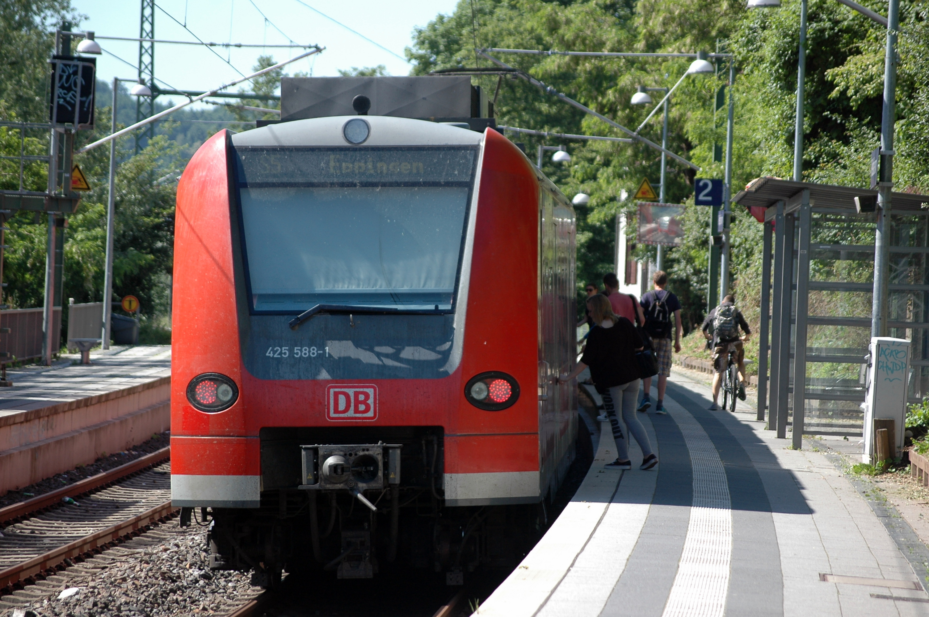 Reilsheim - DBAG Class 425 588-1